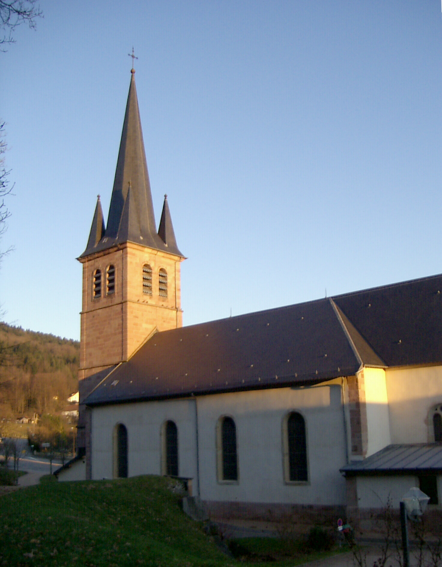 L'église Saints-Nabord-et-Gorgon à Saint-Nabord